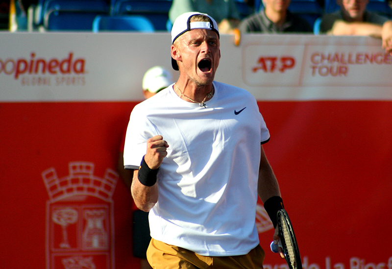 Final del Challenger de El Espinar en el que Nicola Kuhn se hizo con el triunfo